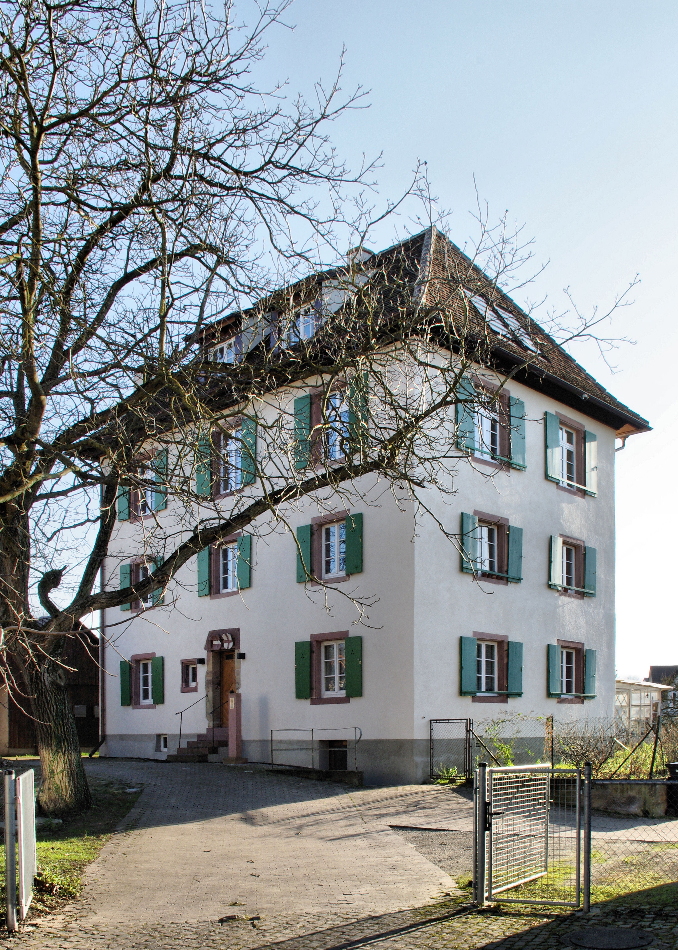 Andere Ansicht des Weiherschlößchens